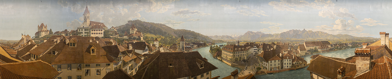 Das Thun-Panorama, ehemals Wocher-Panorama, ist ein Rundbild der Stadt Thun. Standort: Thun, Schadaupark